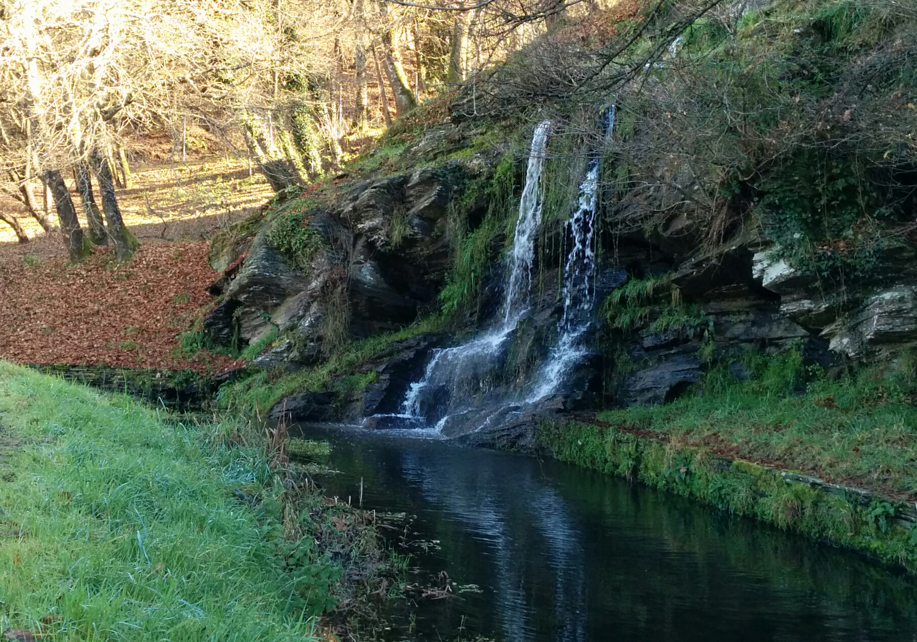 Fervenza pola que desemboca o rego de Samai no río Rato, en Lugo.